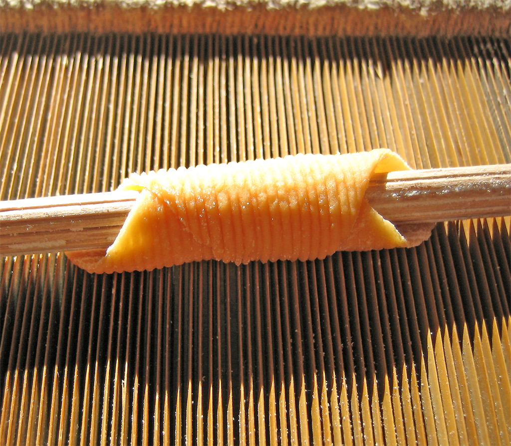 sfoglia colorata con concentrato di pomodoro